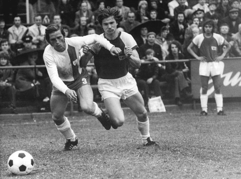 ADN-ZB-Franke-1-6-1974-sche-Berlin: Aufstiegsspiel zur Fußball-Oberliga 1. FC Union Berlin - HFC Chemie 1:2 - Der Hallenser Verteidiger Dressel (1) kann in dieser Situation den Berliner Stoßstürmer Röpcke nicht bremsen. Mit diesem Sieg schuf der HFC eine günstige Ausgangsposition für den Wiederaufstieg in die höchste Spielklasse.